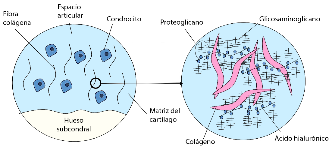 Los elementos de la matriz del cartílago, incluyendo la estructura relativa de los glicosaminoglicanos